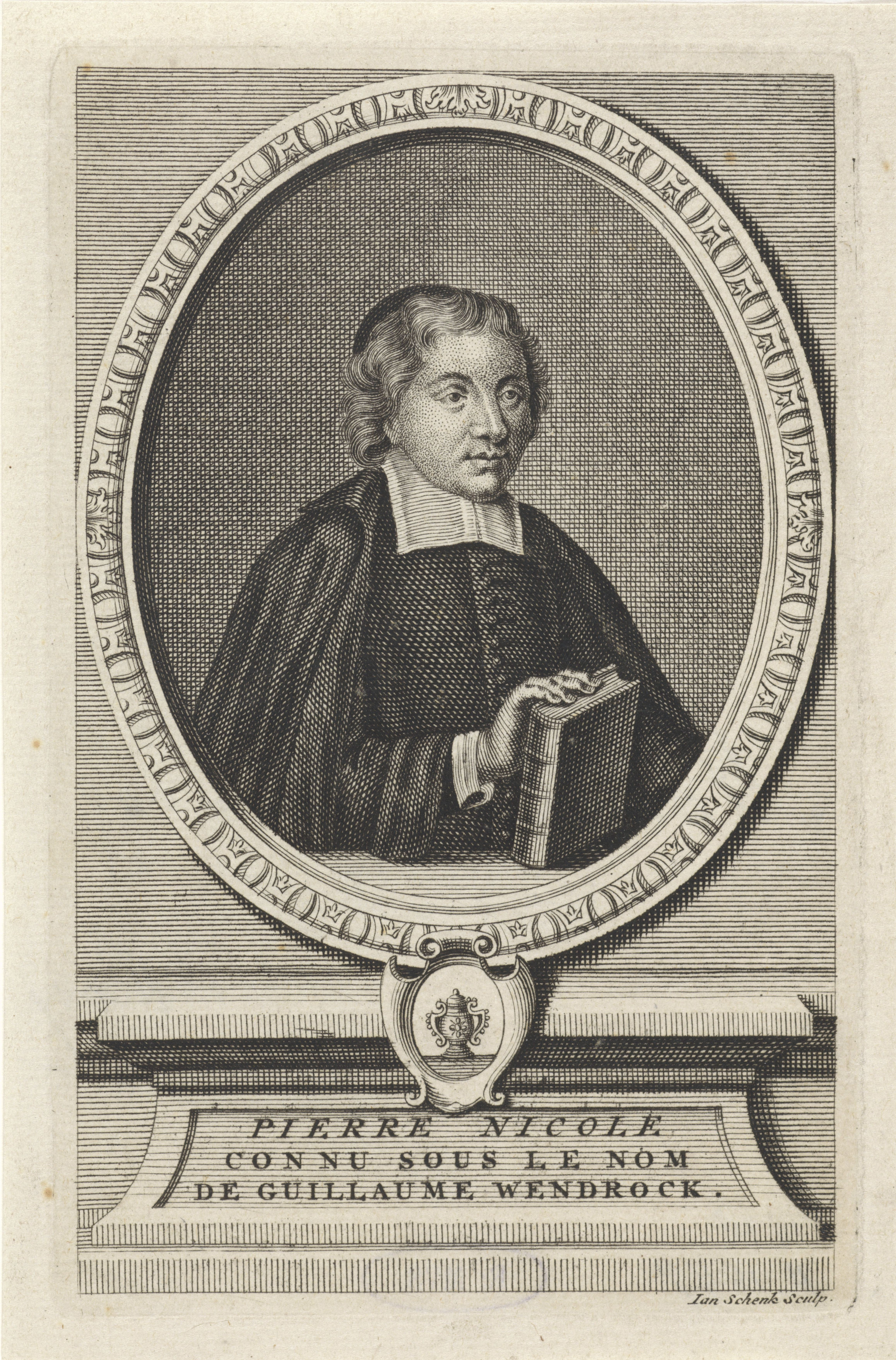 IdentificatieTitel(s): Portret van Pierre NicoleObjecttype: prent Objectnummer: RP-P-1878-A-1547Opschriften / Merken: verzamelaarsmerk, verso midden onder, gestempeld: Lugt 2228Omschrijving: Portret naar rechts van de predikant Pierre Nicole in een ornamentele omlijsting. Zijn rechterhand rust op een boek. Onder het portret de naam van de geportretteerde.VervaardigingVervaardiger: prentmaker: Jan Schenk (vermeld op object)Plaats vervaardiging: AmsterdamDatering: 1713 - 1752Fysieke kenmerken: ets en gravureMateriaal: papier Techniek: etsen / graveren (drukprocedé)Afmetingen: plaatrand: h 130 mm × b 84 mmOnderwerpWat: historical personsbookWie: Pierre NicoleVerwerving en rechtenVerwerving: aankoop 7-jan-1878Copyright: Publiek domein